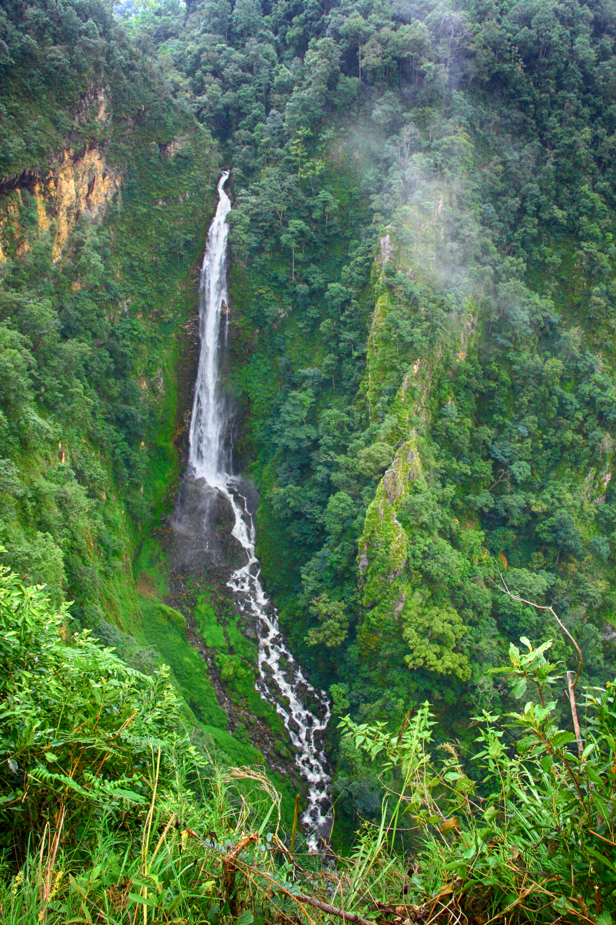 อุทยานแห่งชาติน้ำตกแม่สุรินทร์